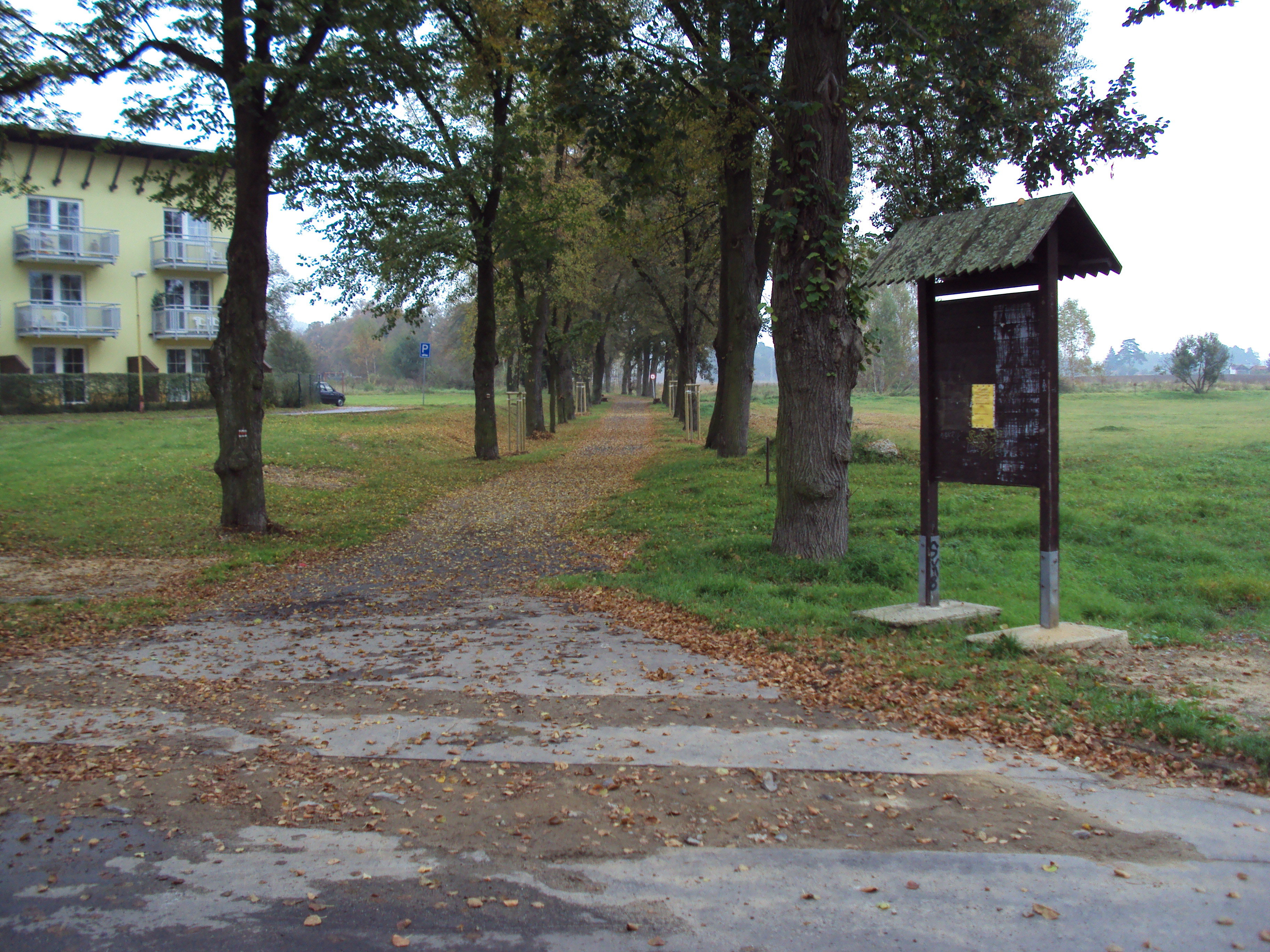 Alej pro pěší z Mimoně od koupaliště do vesničky Vranov, foceno v Mimoni